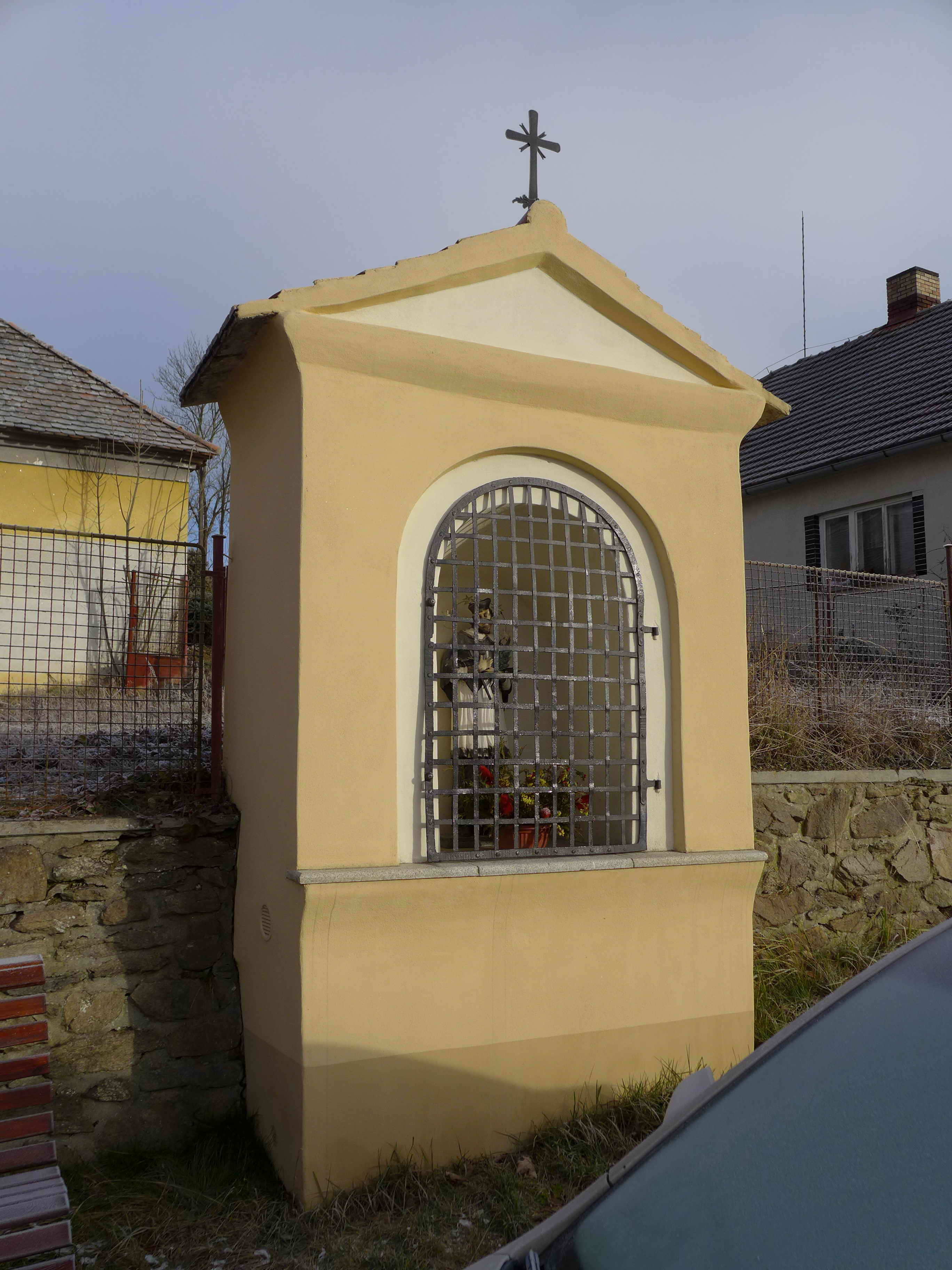 Výklenková kaplička - poklona, náves, Dyjice.